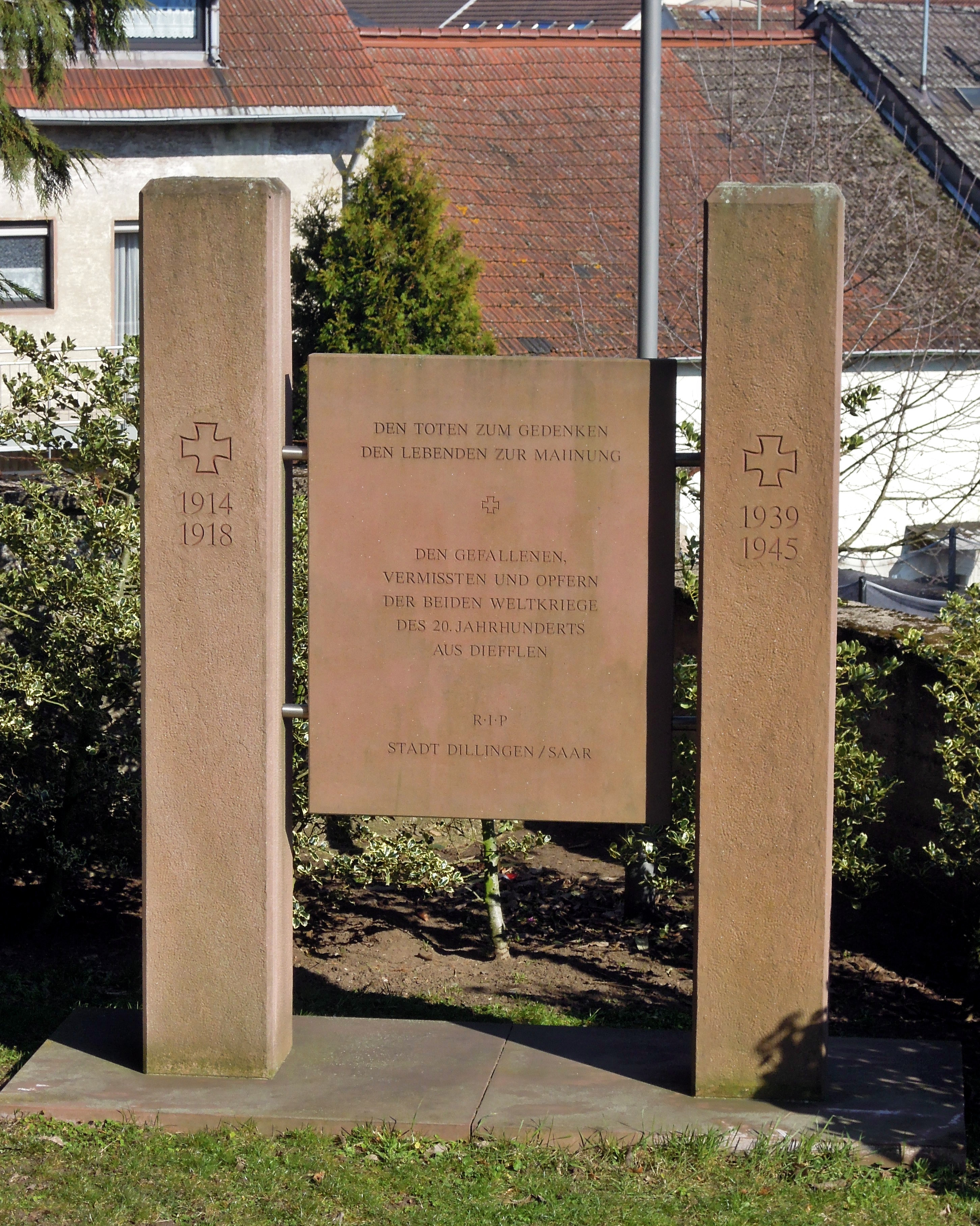 Denkmal für die Gefallenen im Ersten und Zweiten Weltkrieg in Diefflen